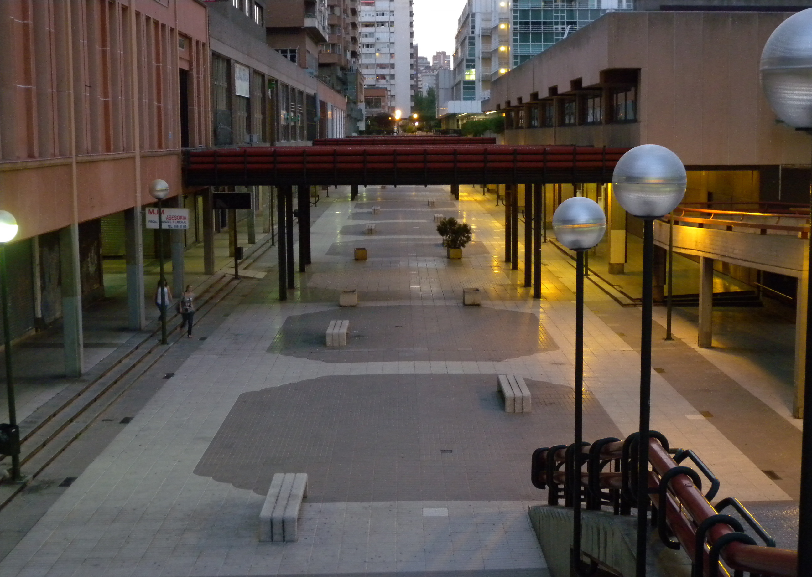 AZCA